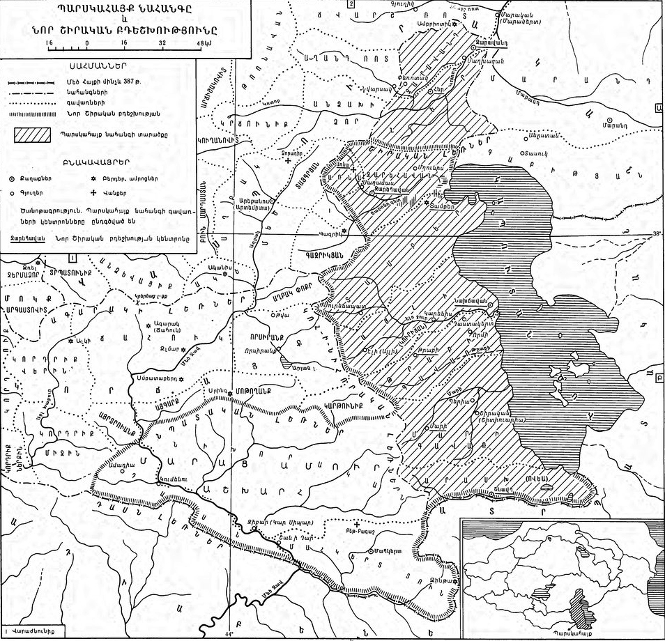 Պարսկահայք նահանգ